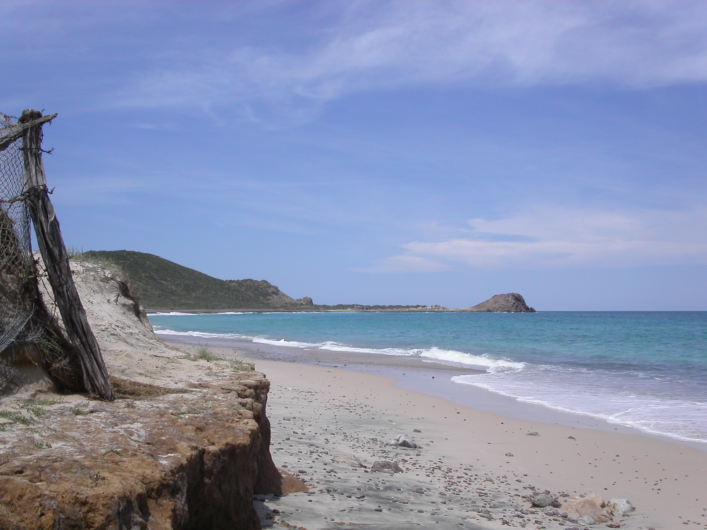 Playa de Cabo Pulmo